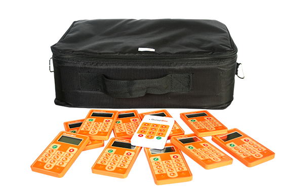 Boitier de vote Quizzbox + Sac à dos